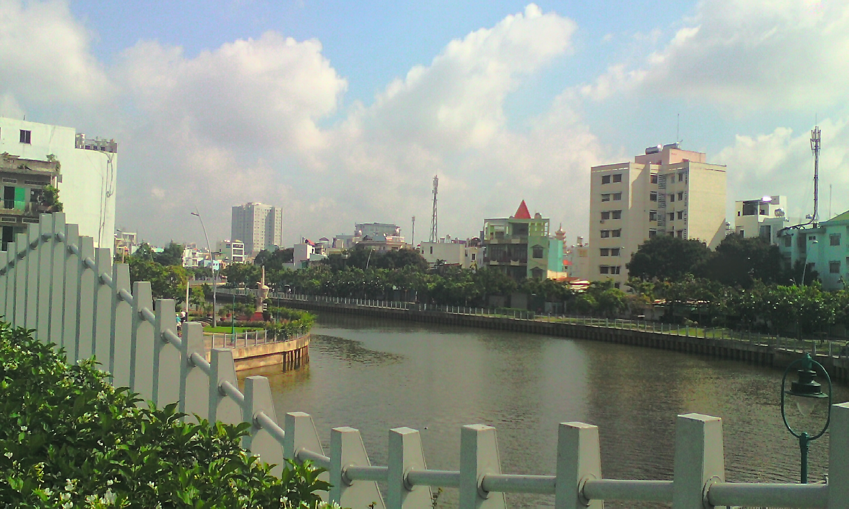 Kênh NL-TN nhìn từ cầu Kiệu